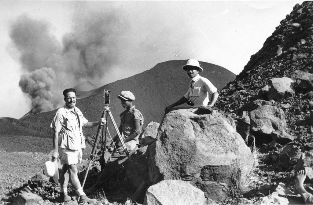 Orlando Ribeiro photographiant l'éruption volcanique de l'île de Fogo, dans l'archipel du Cap Vert, en 1951.